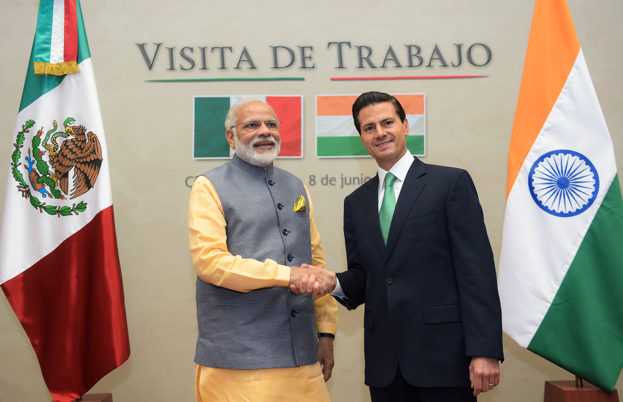 El Presidente Enrique Peña Nieto recibió al Excelentísimo Señor Narendra Modi, Primer Ministro de la República de la India, quien realizó una Visita de Trabajo en México.